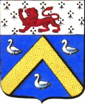 Armes de la famille Behaghel